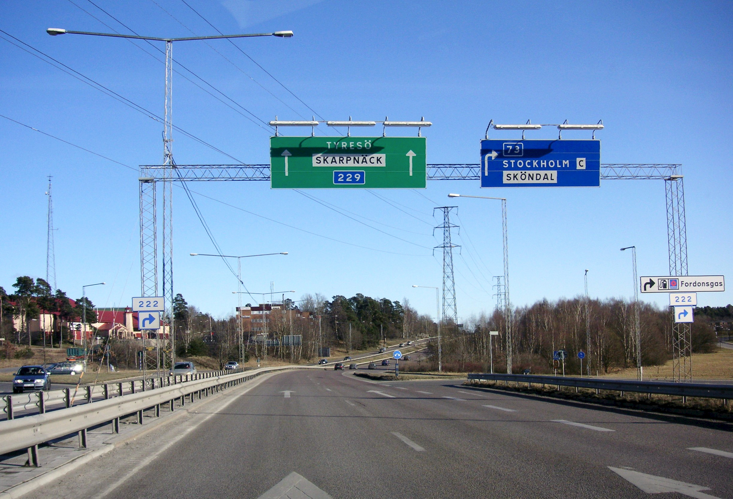 Länsväg 229, Tyresövägen i Stockholm